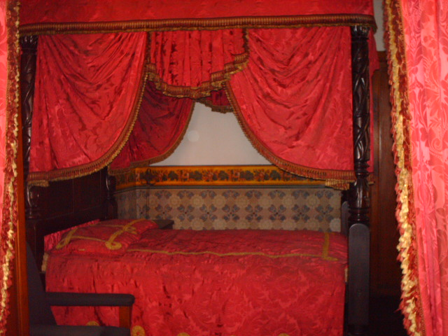 Cama de la casa natal de Simón Bolívar